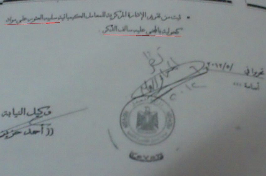 دليل برائة الشهيد محمد جمال المصرى من تناولة الكحوليات